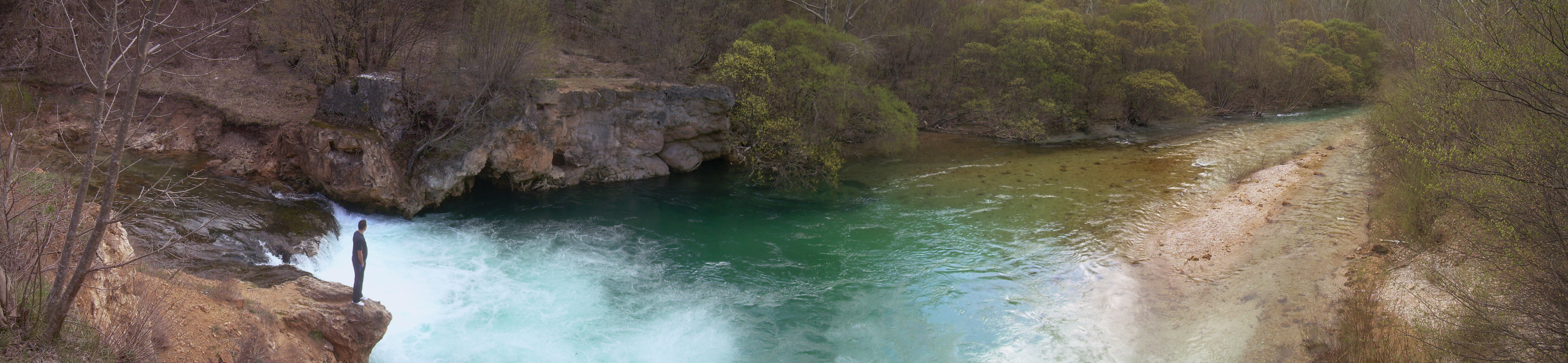 Панорама малог слапа на реци Крчић. Слика је направљена 2. априла 2010.